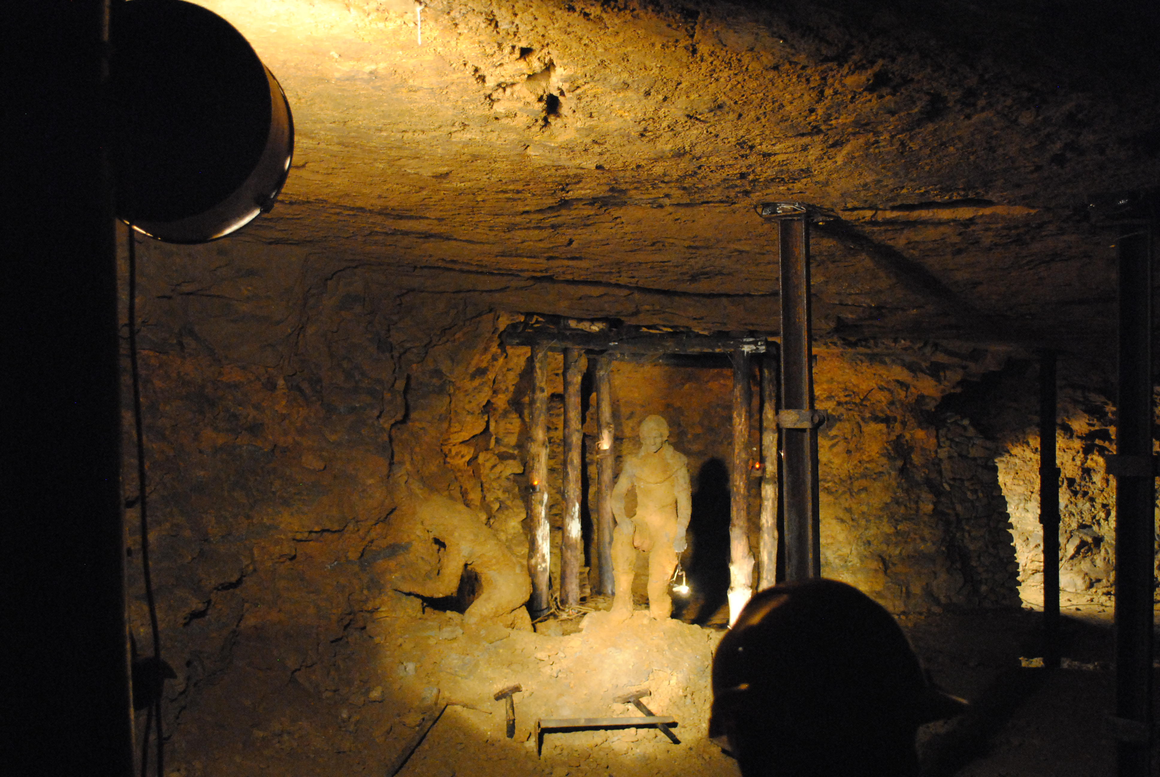 Zabytkowa Kopalnia Rud Srebronośnych w Tarnowskich Górach - komora podziemna